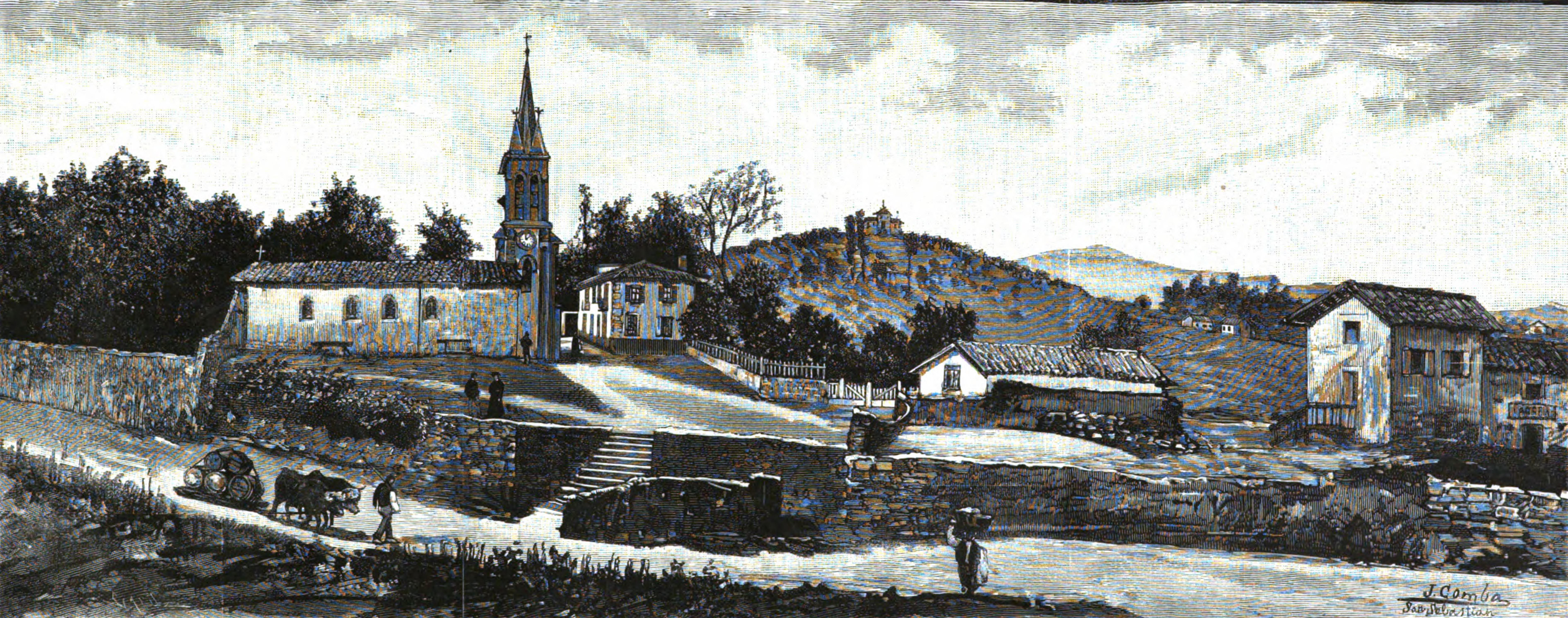 San Sebastián.—La vieja iglesia de San Sebastián «el Antiguo» y sus alrededores, antes de la construcción del palacio de Miramar. Dibujo del natural, por Comba.